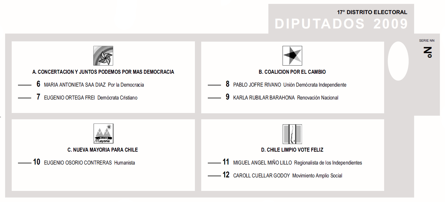 Reproducción facsimilar del voto utilizado para la elección de diputados en el Distrito 17 de Chile en 2009.